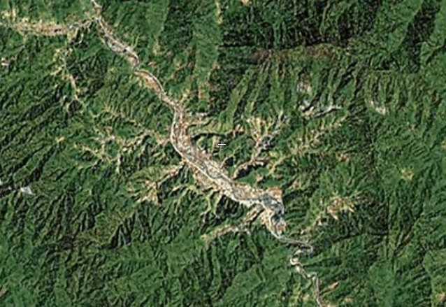 中文（中国大陆）: 陕西省汉中市留坝县卫星图。